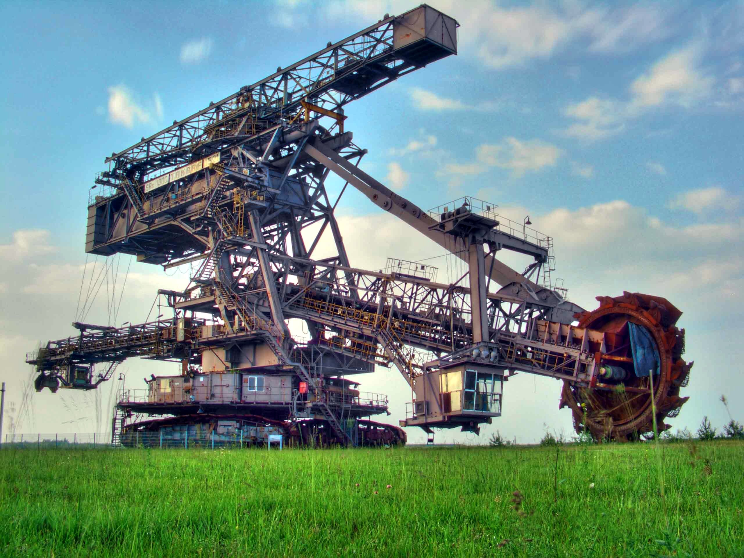 Schaufelradbagger in Ferropolis